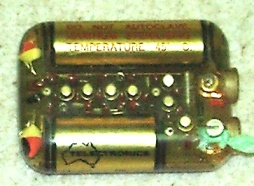 Telectronics pacemaker model P6 1967 VVI